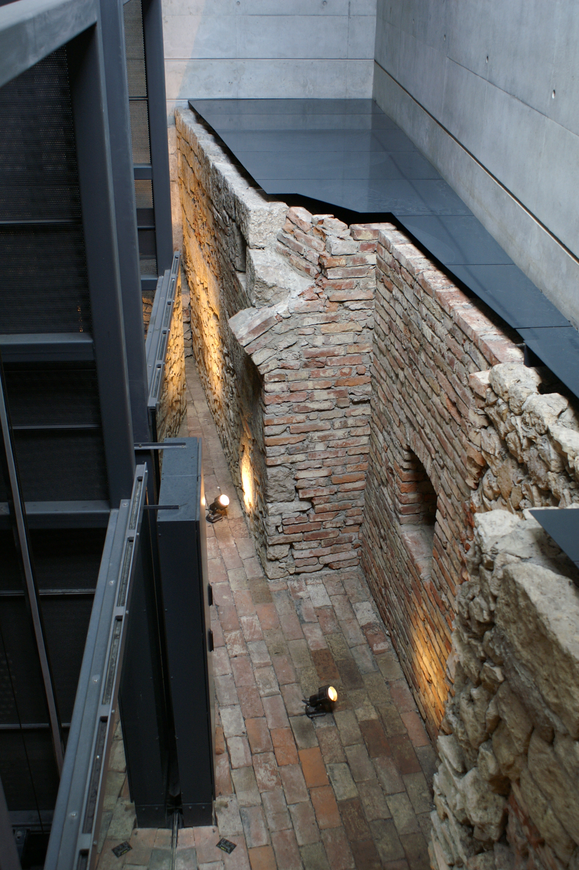 Die im Jahr 2006 fertiggestellte Tiefgarage beim Rathaus in Ulm erhält 2009 den Hugo-Häring-Preis, die höchste Architektur-Auszeichnung in Baden-Württemberg. Die Erschließungskerne sind tageslichthell und geben Einblick in die Stadtarchäologie. Ein zentraler Fußgängerweg und Bildtafeln mit Motiven der Stadtarchitektur wird ebenfalls besonders positiv bewertet.